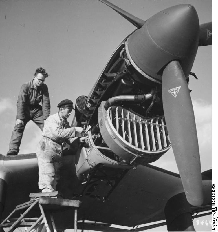 Flugzeug Junkers Ju 87 Flugzeugbau 1944 447 44 [Arbeiten am Motor eines Sturzkampfbombers (Stuka) Junkers Ju 87]